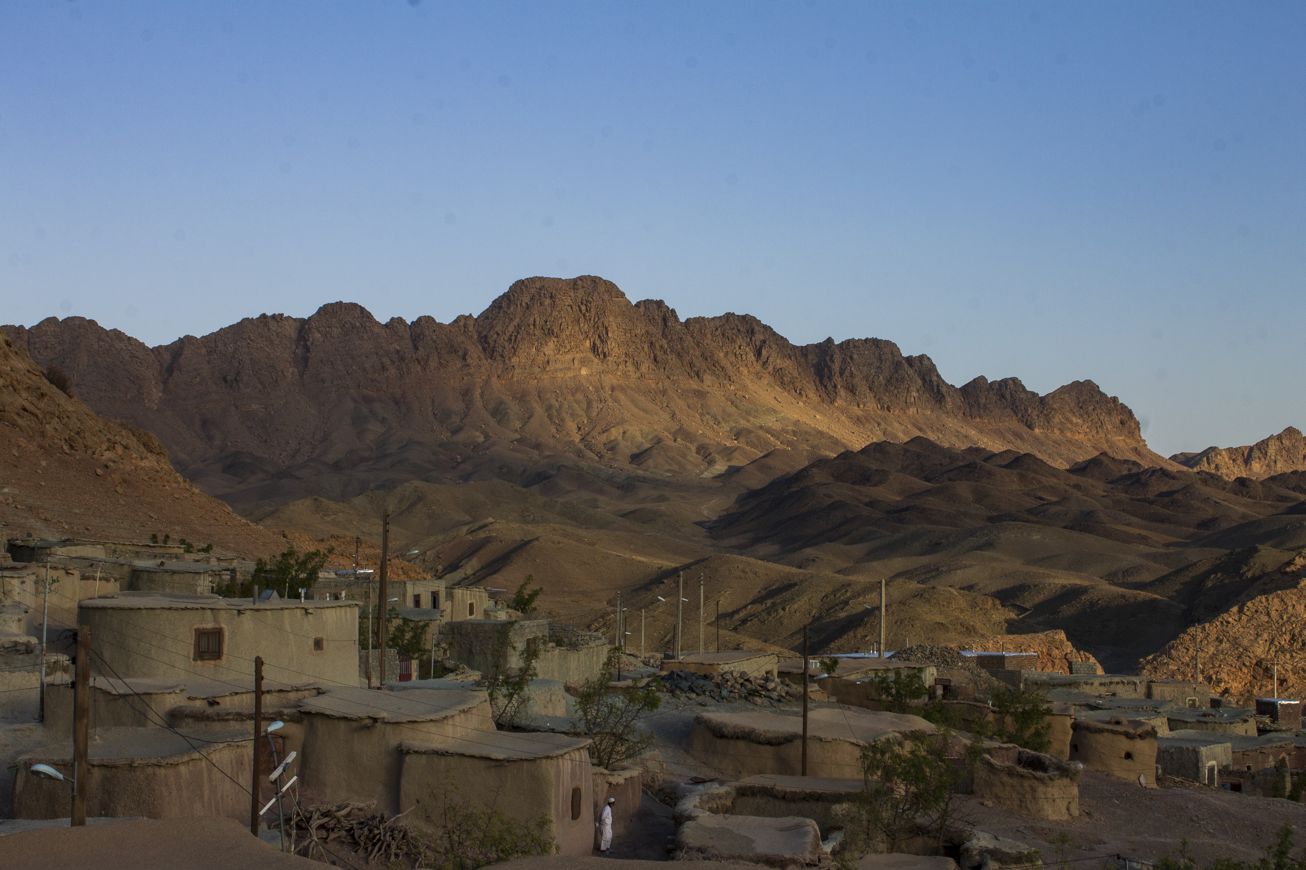 ماخونیک